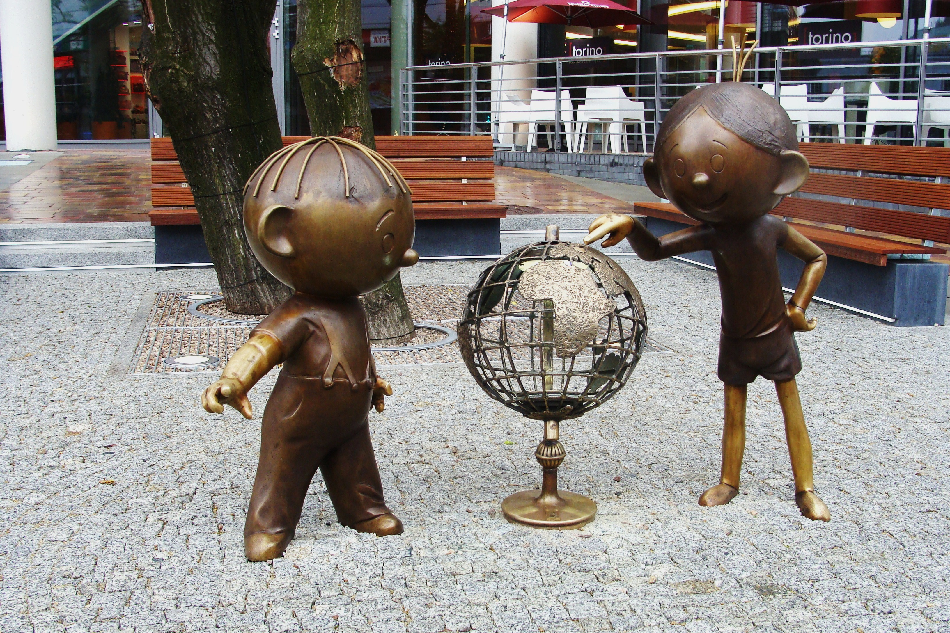 Bolek i Lolek . Filmy z ich udziałem odniosły wielki sukces w kraju i za granicą. Były nadawane w wielu krajach na wszystkich kontynentach.